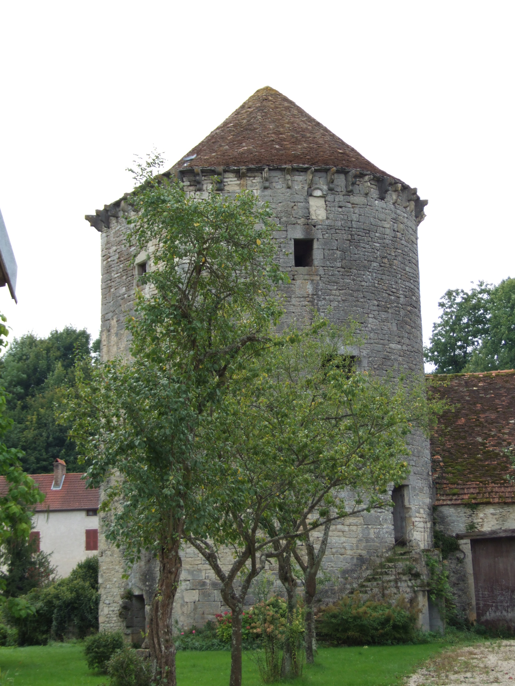 Tour des Chaux, Bèze, Côte d'Or, Bourgogne, FRANCE